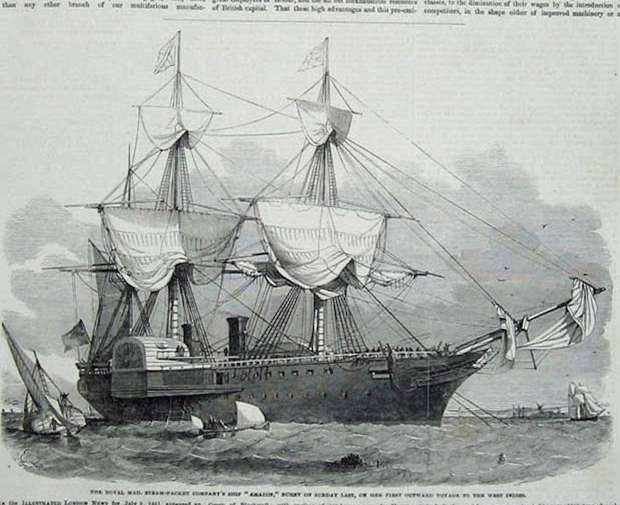 L'Amazon, paquebot de la Royal Mail Steam Packet Company, incendié et coulé lors de son voyage inaugural en 1852